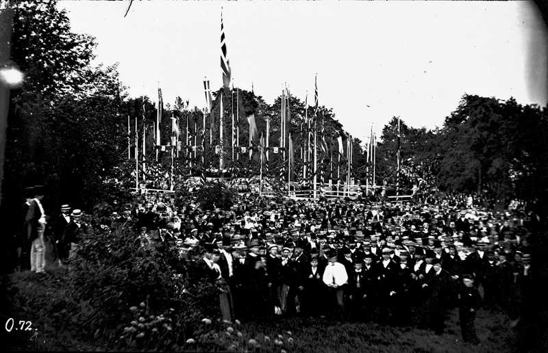 Bryllupsfest på Bygdø kongsgård i forbindelse med at Frederik VIII giftet seg med Lovisa av Sverige i Stockholm 28. juli 1869.jorde, telt, flagg, mennesker, bryllupsfest.